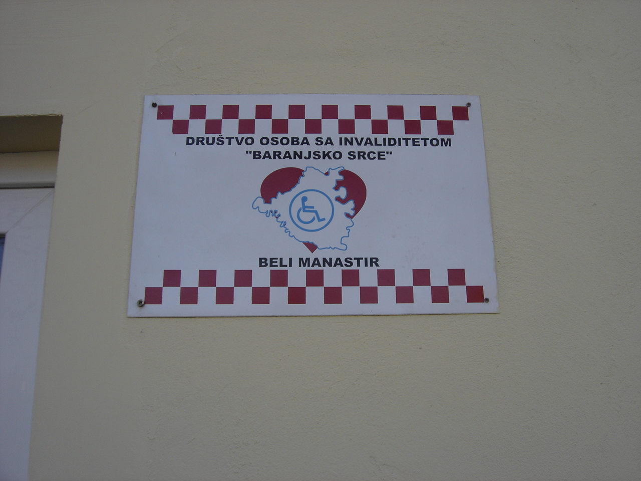 Baranjsko srce, Beli Manastir